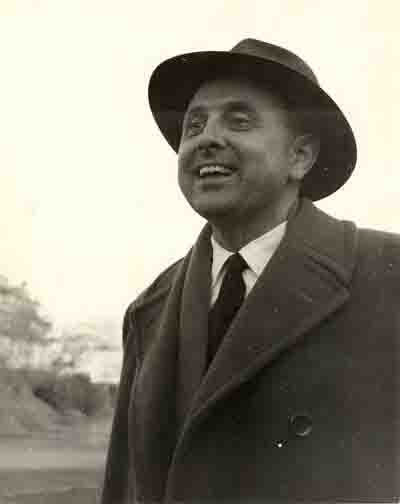 foto di Eugenio Danese presso lo Stadio Olimpico di Roma anni '60